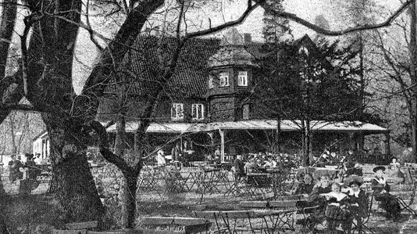 Die Gaststätte "Friedeburg" des Nordenhamer Stadtgründers Wilhelm Müller - Historisches Postkartenmotiv